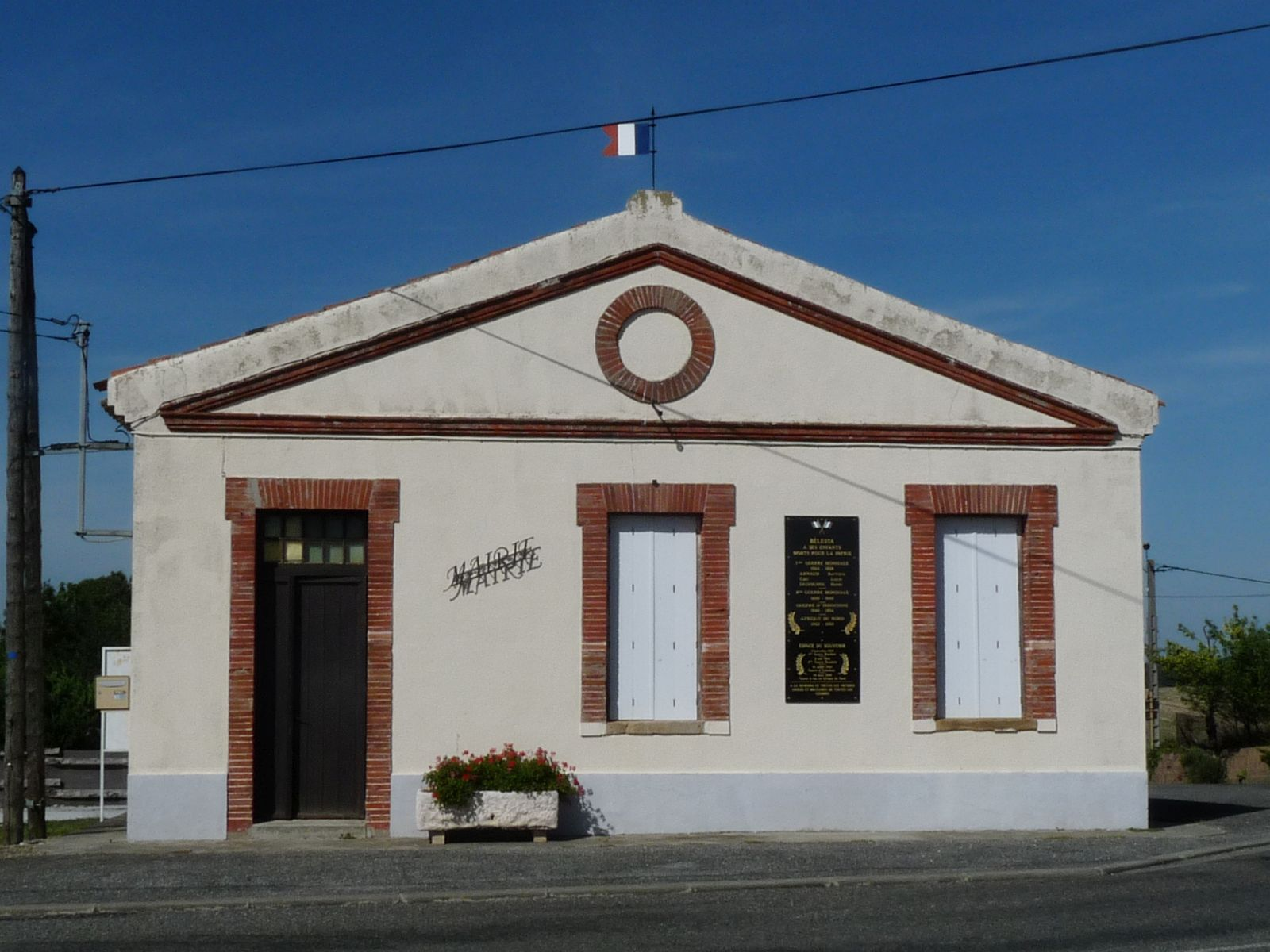 Mairie de Bélesta-en-Lauragais, Haute-Garonne, France